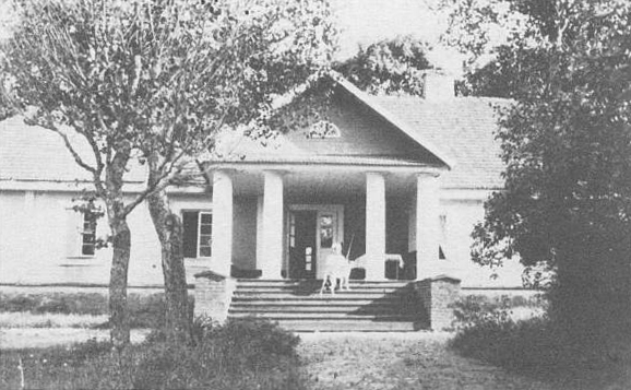 Беларуская (тарашкевіца): Салечнікі Малыя (Salečniki Małyja), сядзіба Мяноўскіх (Mianoŭski)